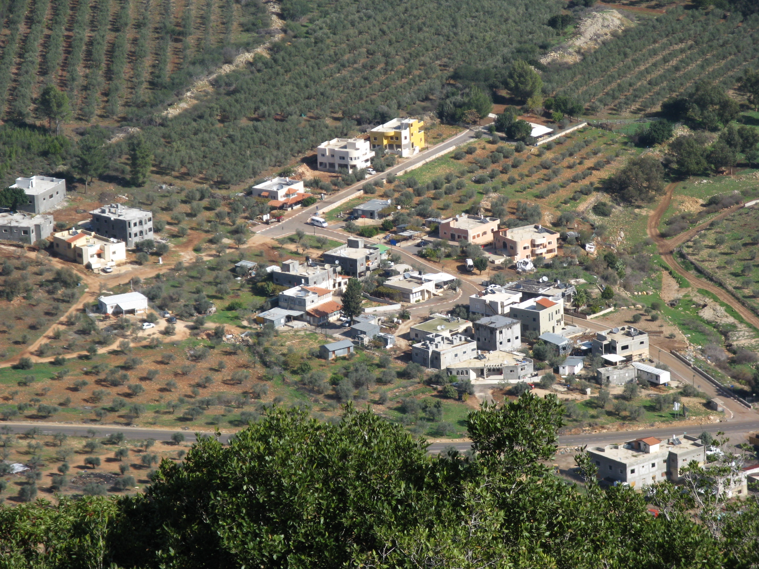 ראס אל-עין כבר ערבי קטן בתחומי המועצה האזורית משגב. צילום מהר כמון